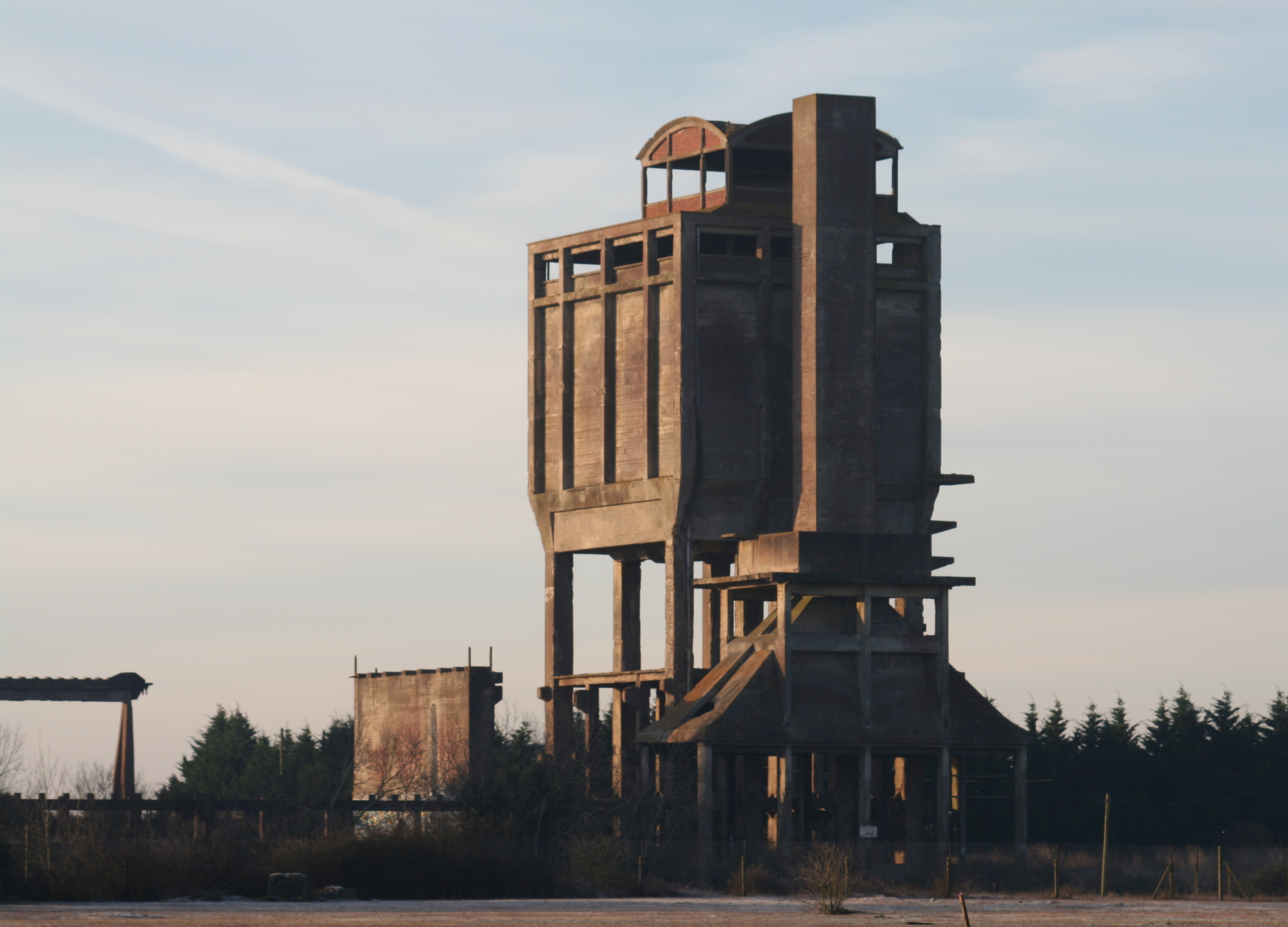 Vestiges des Forges de Trignac